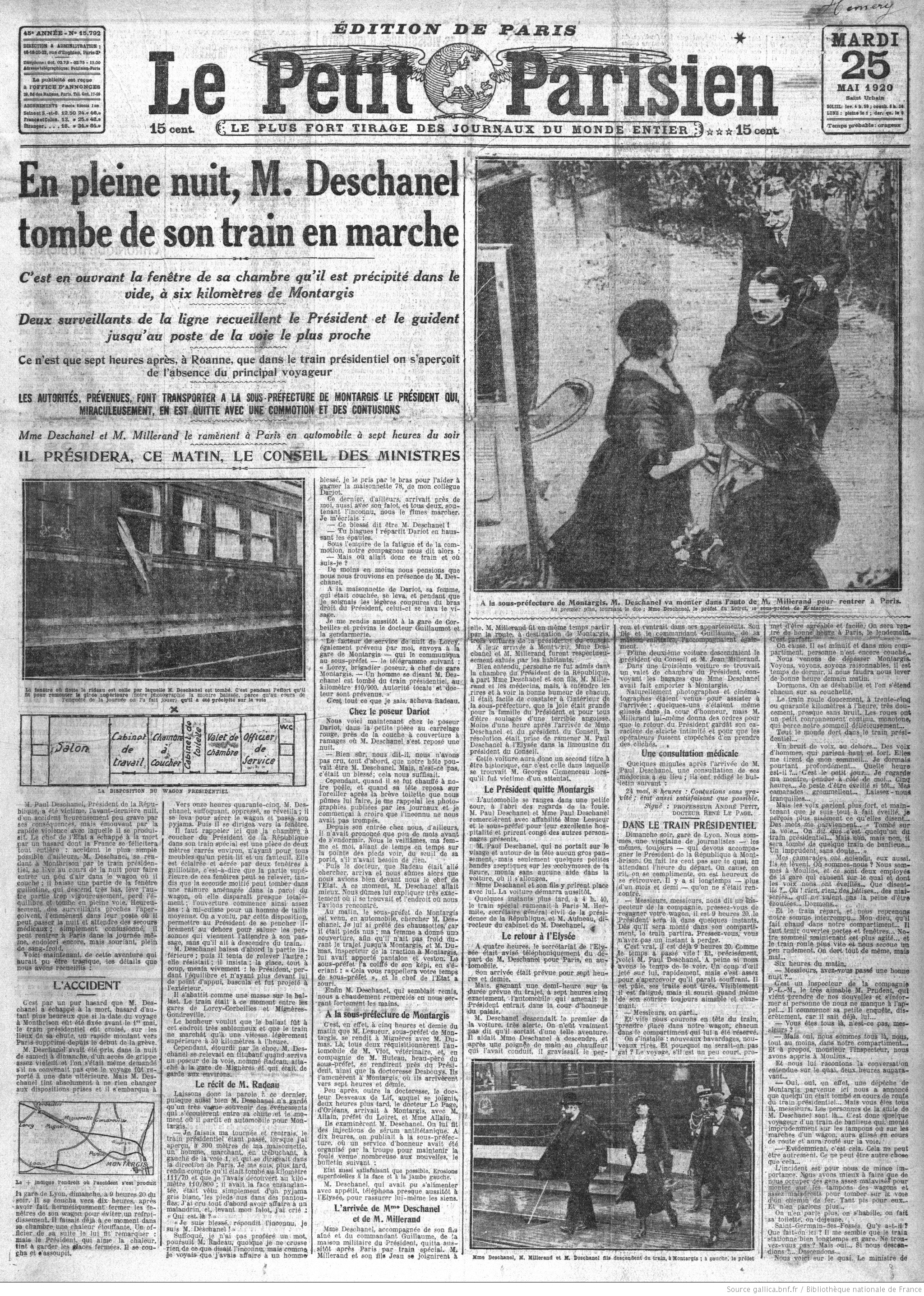 Une du quotidien Le Petit Parisien du 25 mai 1920 faisant état de la chute de train du président de la République, Paul Deschanel.